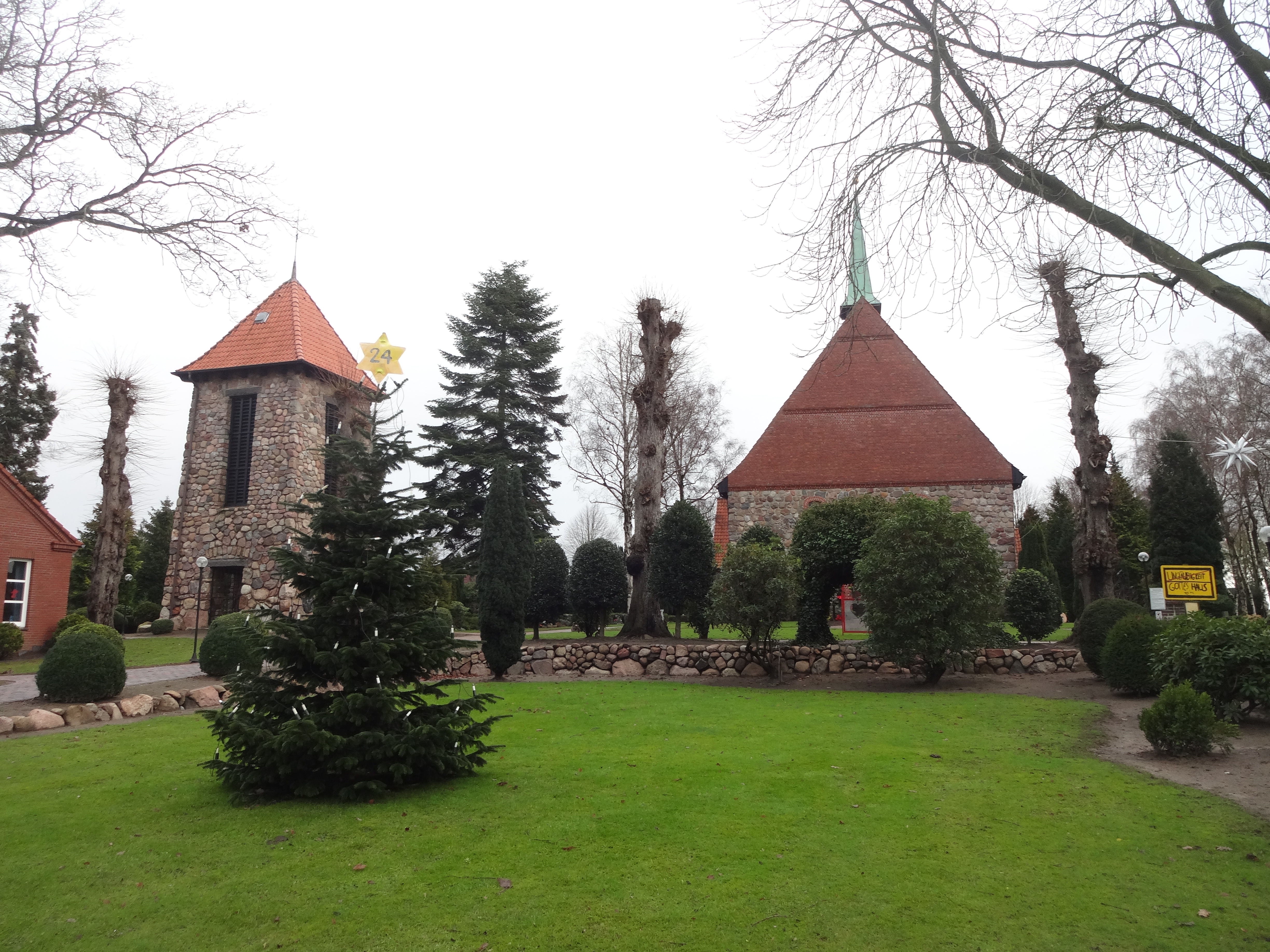 denkmalgeschützte Marienkirche in Hemmingstedt